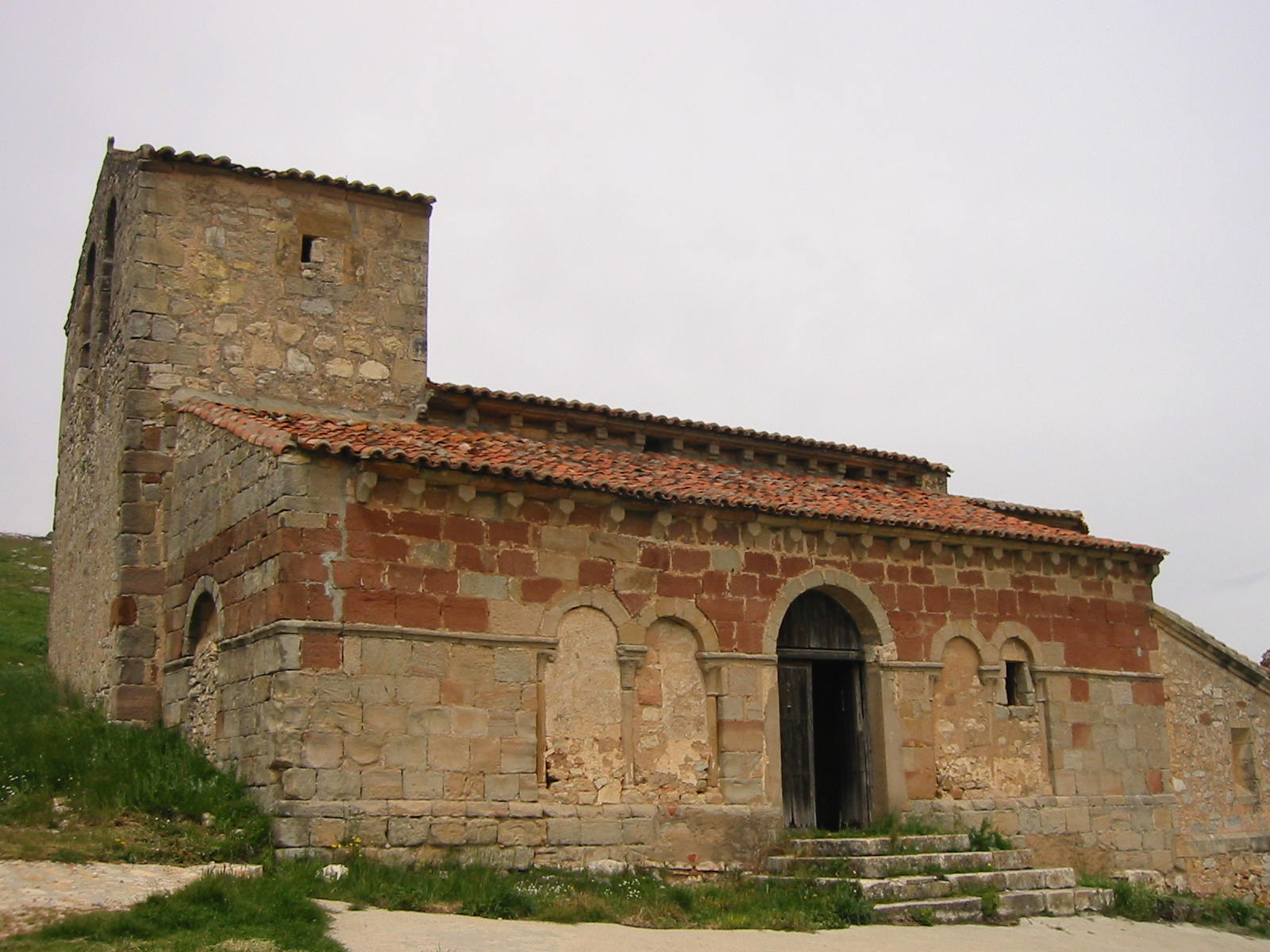 San Juan Degollado (Jodrá del Pinar, Saúca, Guadalajara).